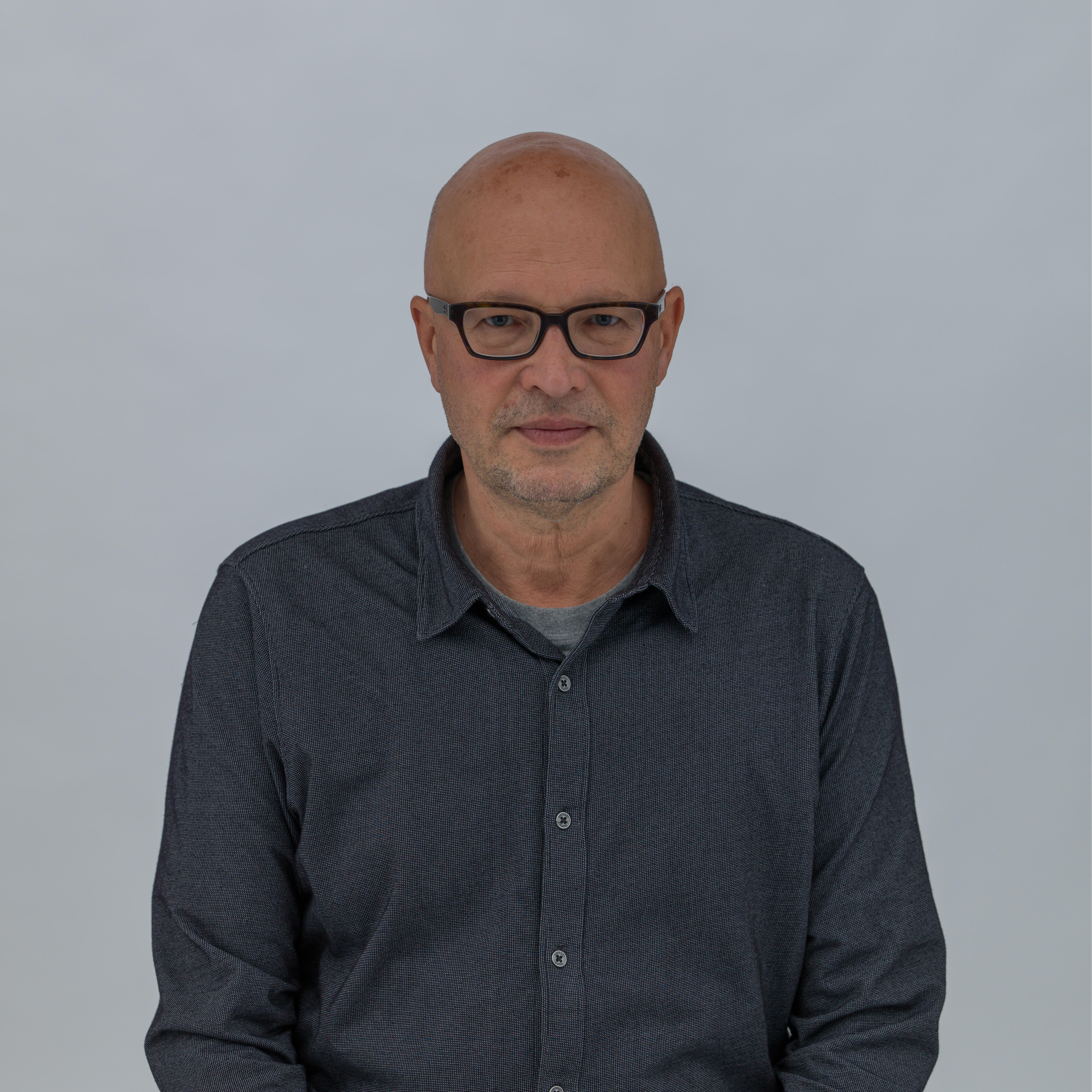 Łukasz Skąpski (1958- ) – polski artysta multimedialny, pedagog